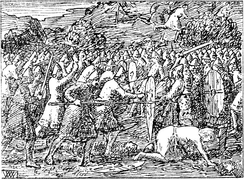 Wilhelm Wetlesen: Illustration for Haraldsønnenes saga (Inges saga), Heimskringla 1899-edition. nn: «Slaget ved Minne.»